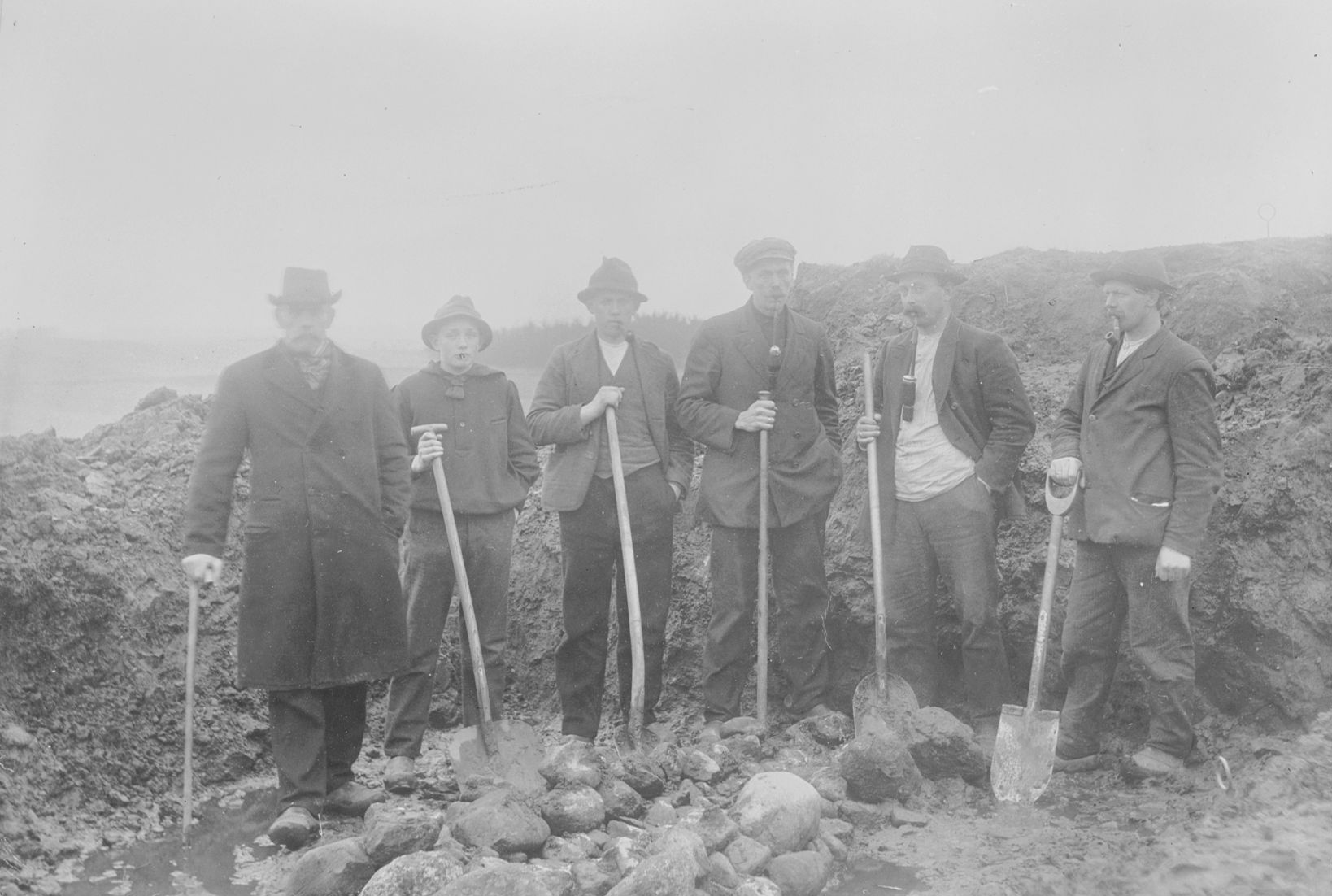 Det lokale udgravningshold i Storhøjen 1921, efter at egekisten med Egtvedpigen er fjernet. Egtved sogn.